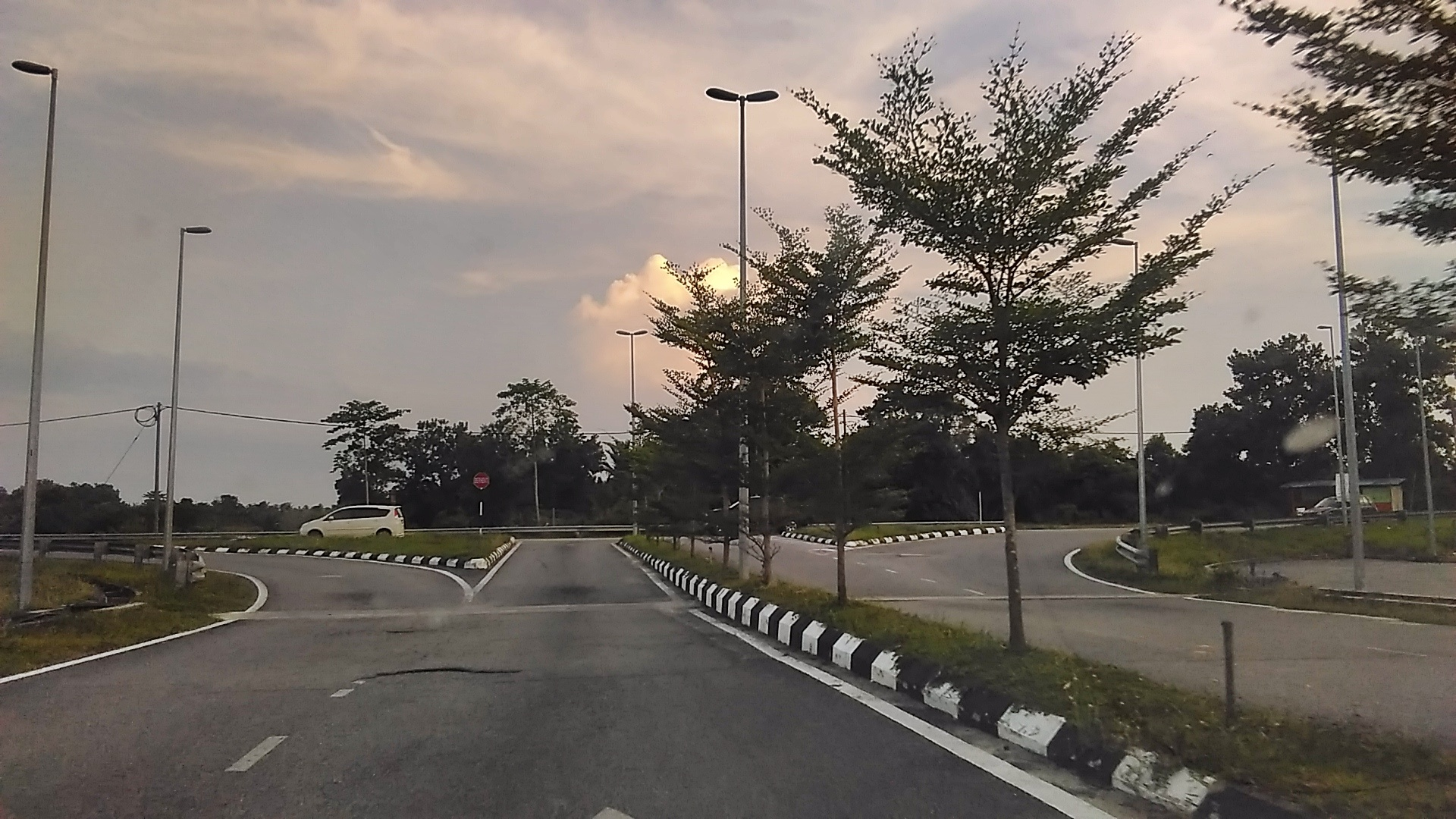 Pasir Puteh Sentral